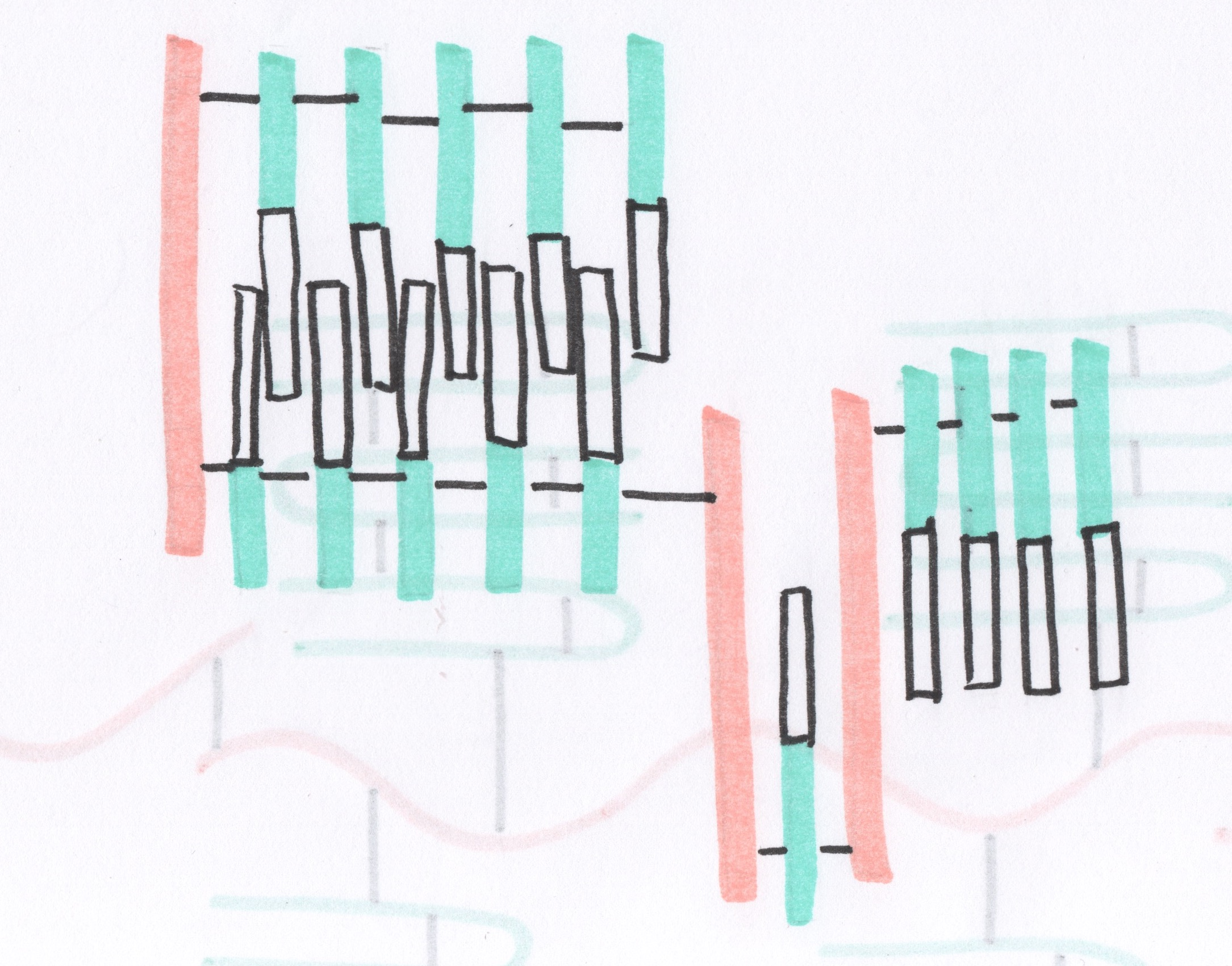 Dibuix estructura Glutenina